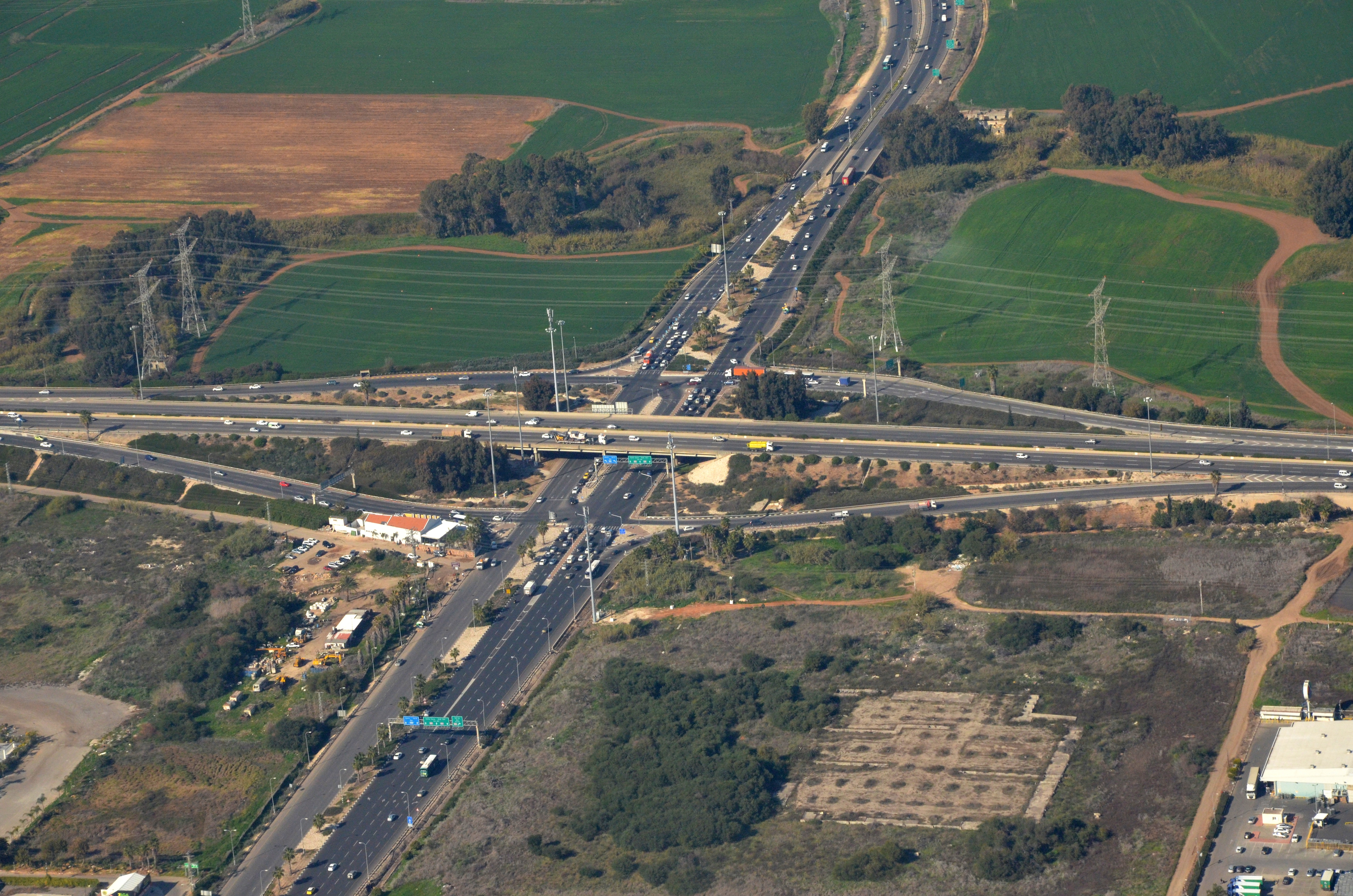 מחלף ירקון